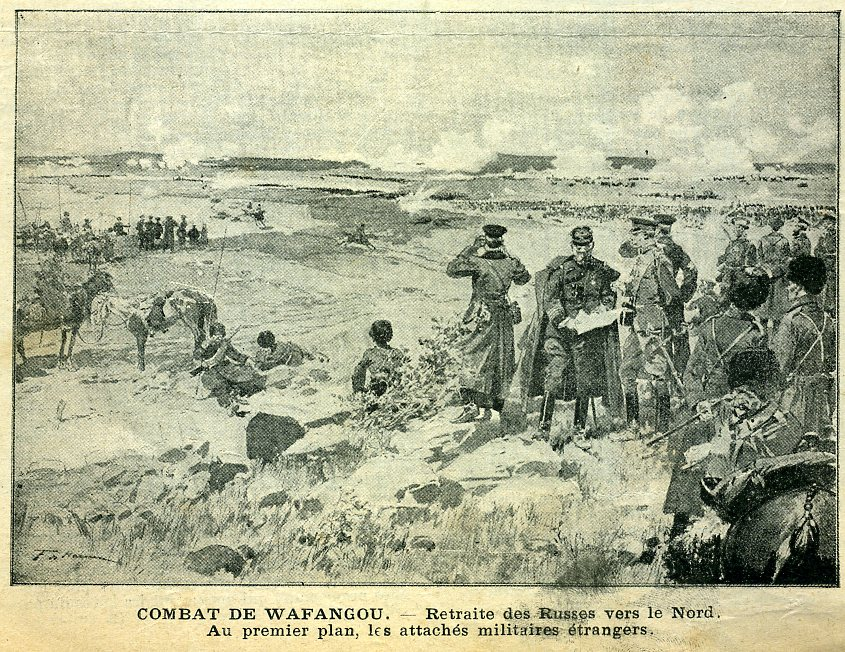 see picture